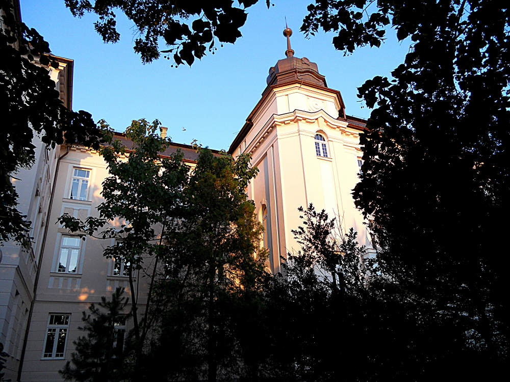 Gimnazija u Bačkom Petrovcu Jan Kolar sa strane od ulice